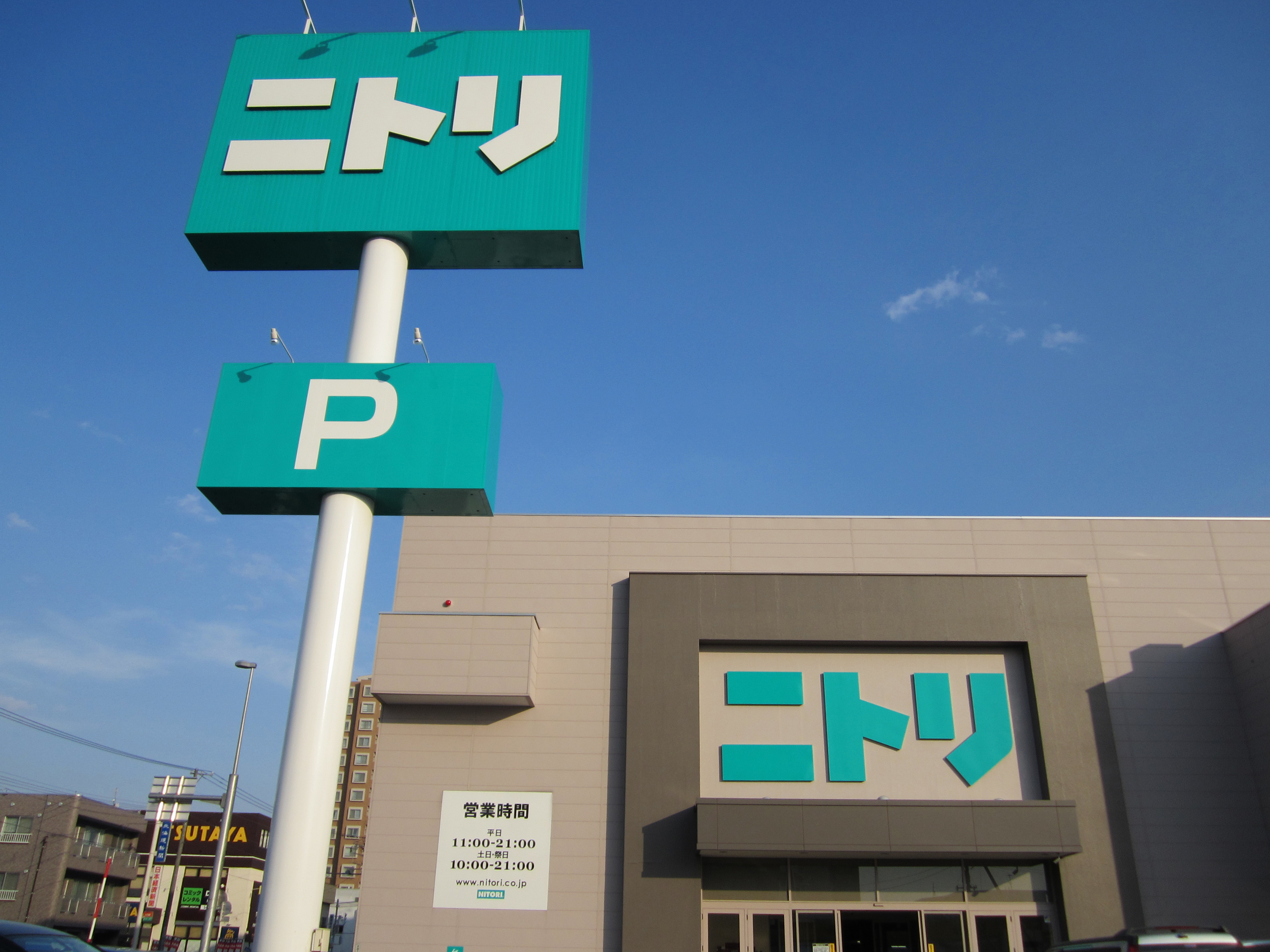 ニトリ美園店（北海道札幌市豊平区）